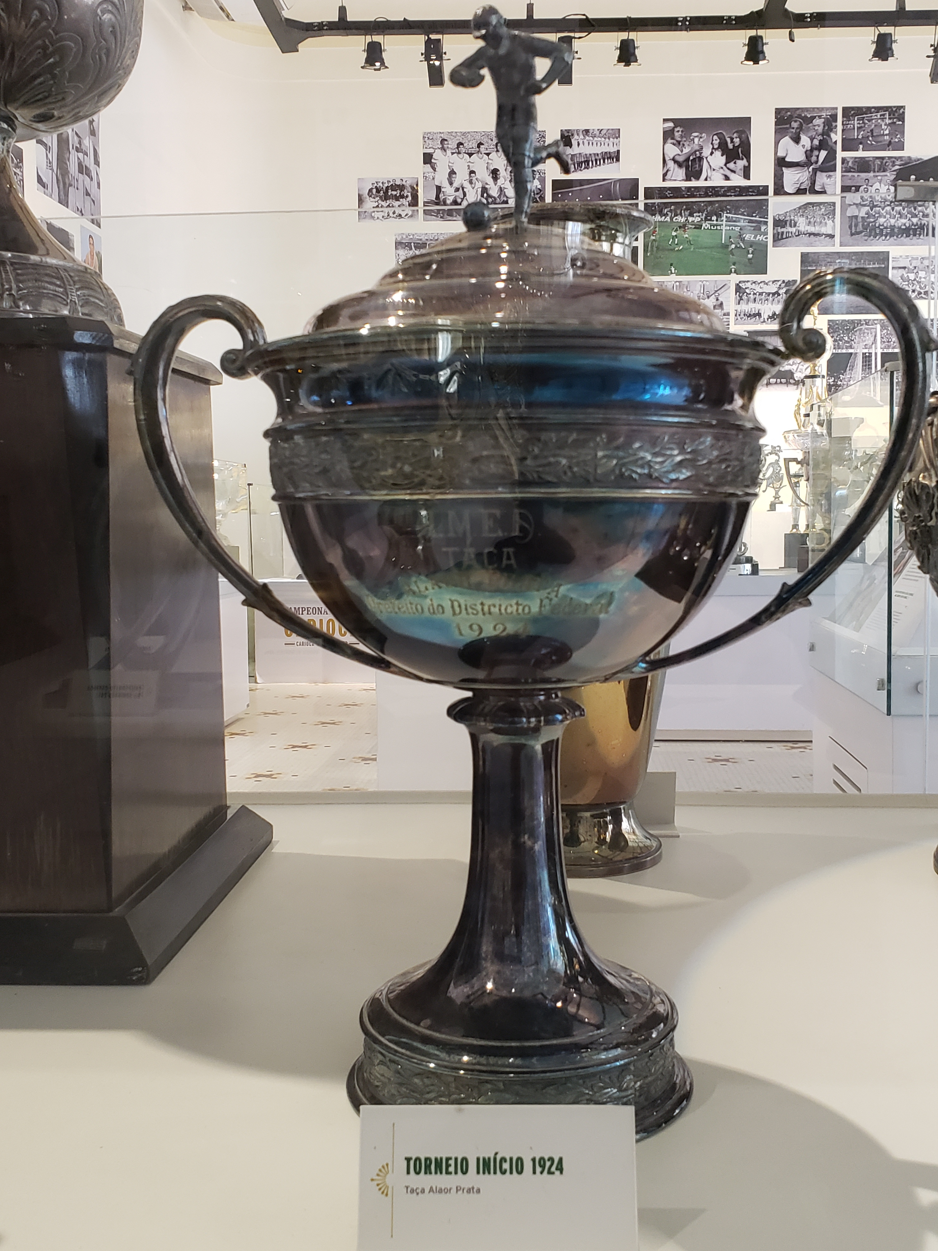 Torneio Início do Campeonato Carioca de Futebol de 1924, conquistado pelo Fluminense Football Club.